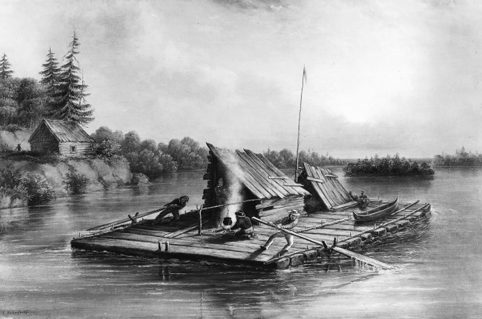 1 raft ou cage sur une rivière